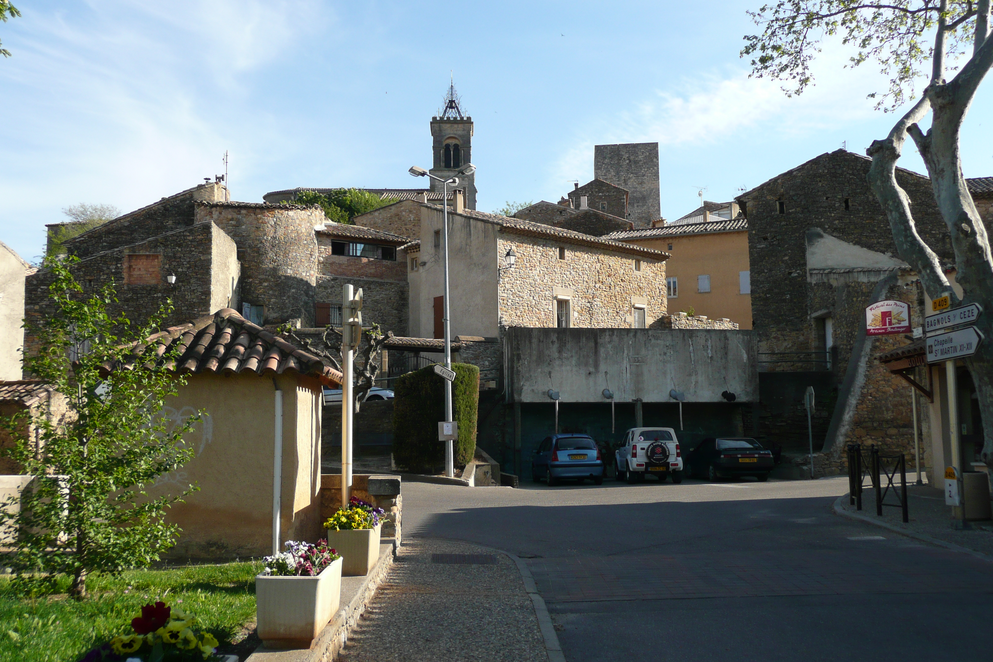 Vue sur Tresques.